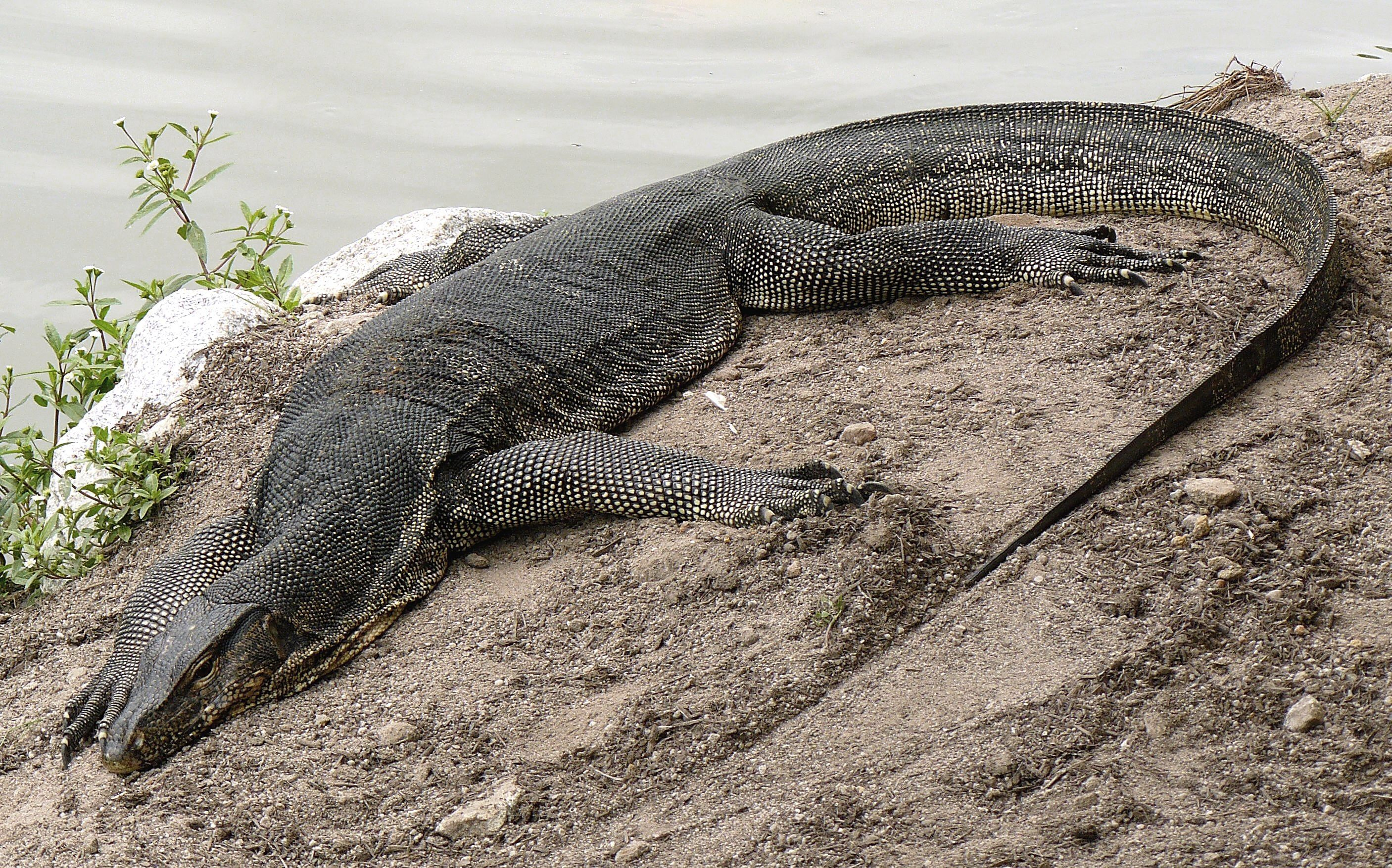 Monitor Lizard, Sungei Buloh Wetlands Reserve, Singapore